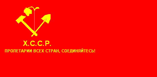 Oʻzbekcha/ўзбекча: Category:Oʻzbekiston: Bayroqlar